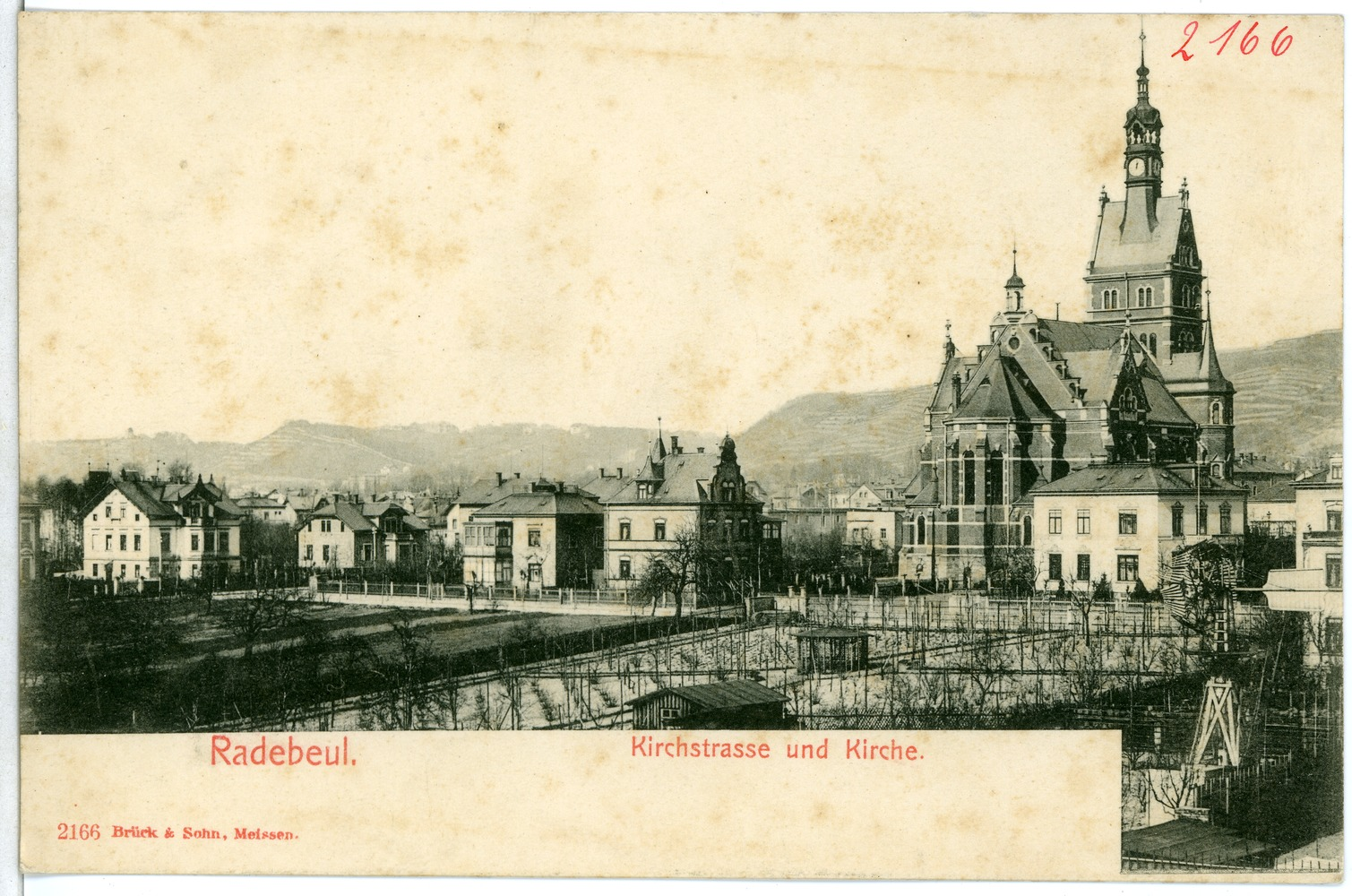 Radebeul; Kirchstraße und Kirche This postcard is from publisher Brück & Sohn in Meißen ( postcard has a unique number 02166 and is available in a higher resolution at the publisher. This images was uploaded in a cooperation project between Wikipedians and the publisher.